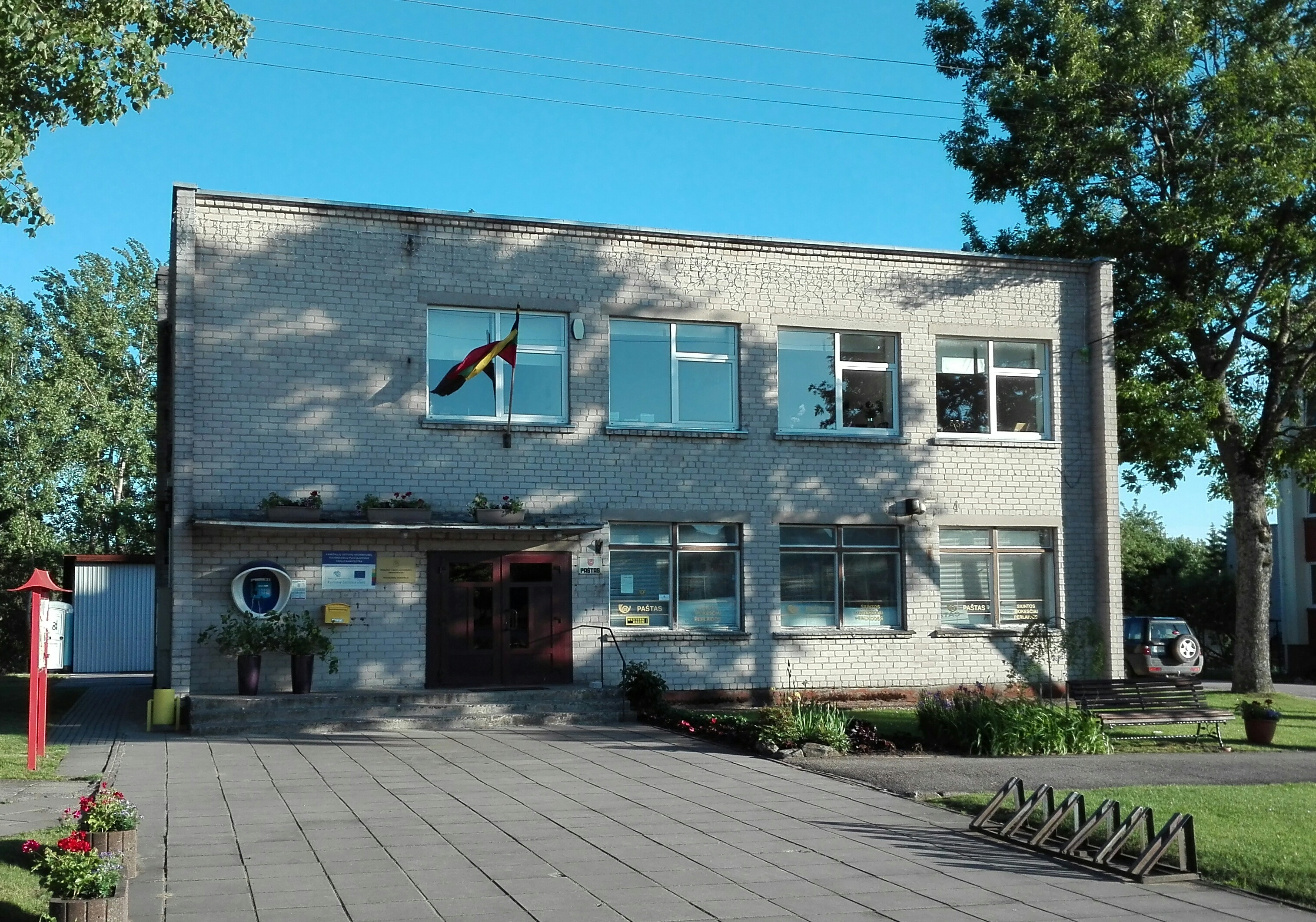 Veiviržėnų seniūnija ir paštas